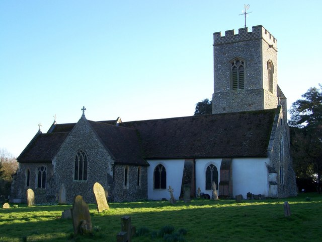 Stutton Church, Suffolk